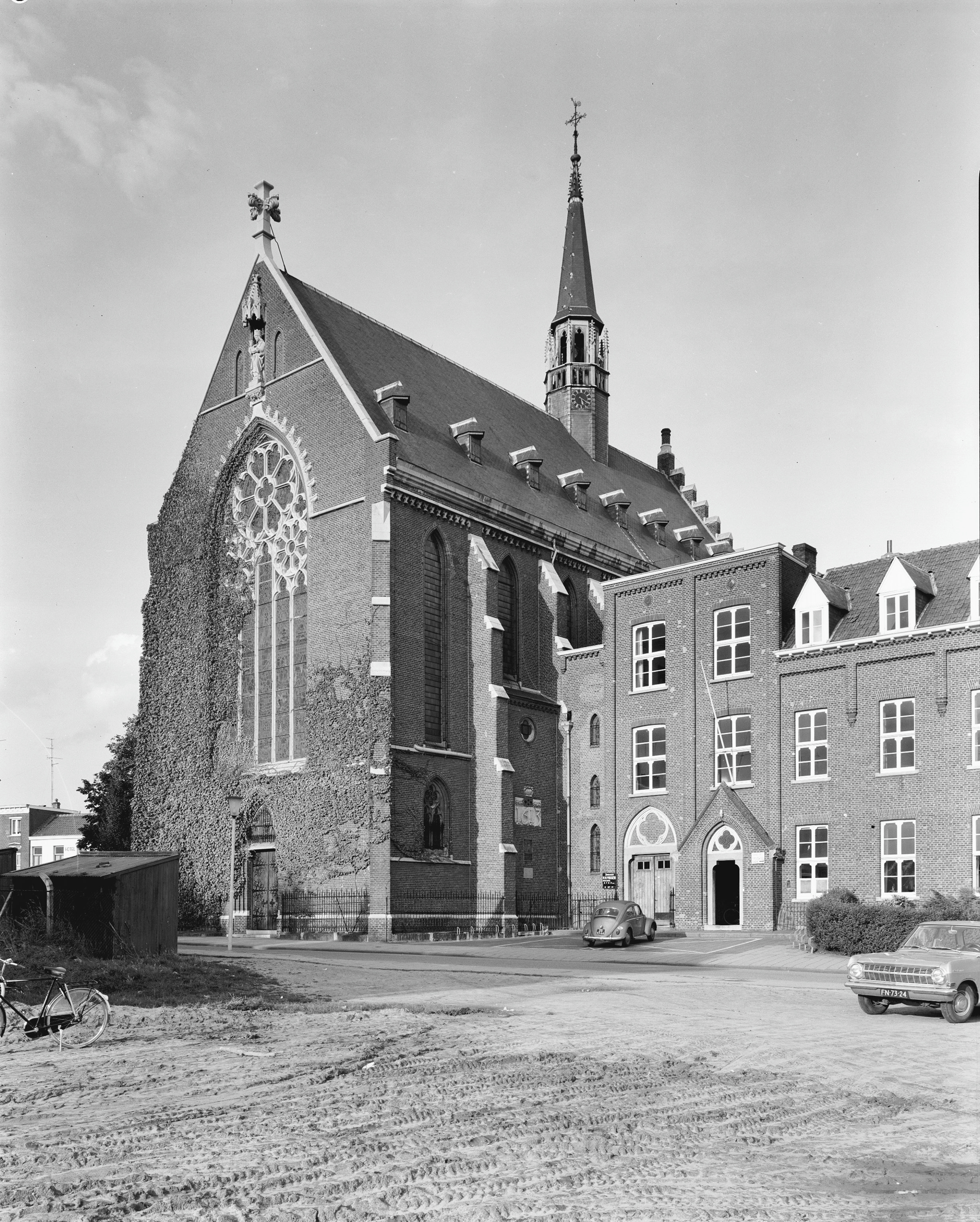 Rooms-Katholieke Kerk: exterieur